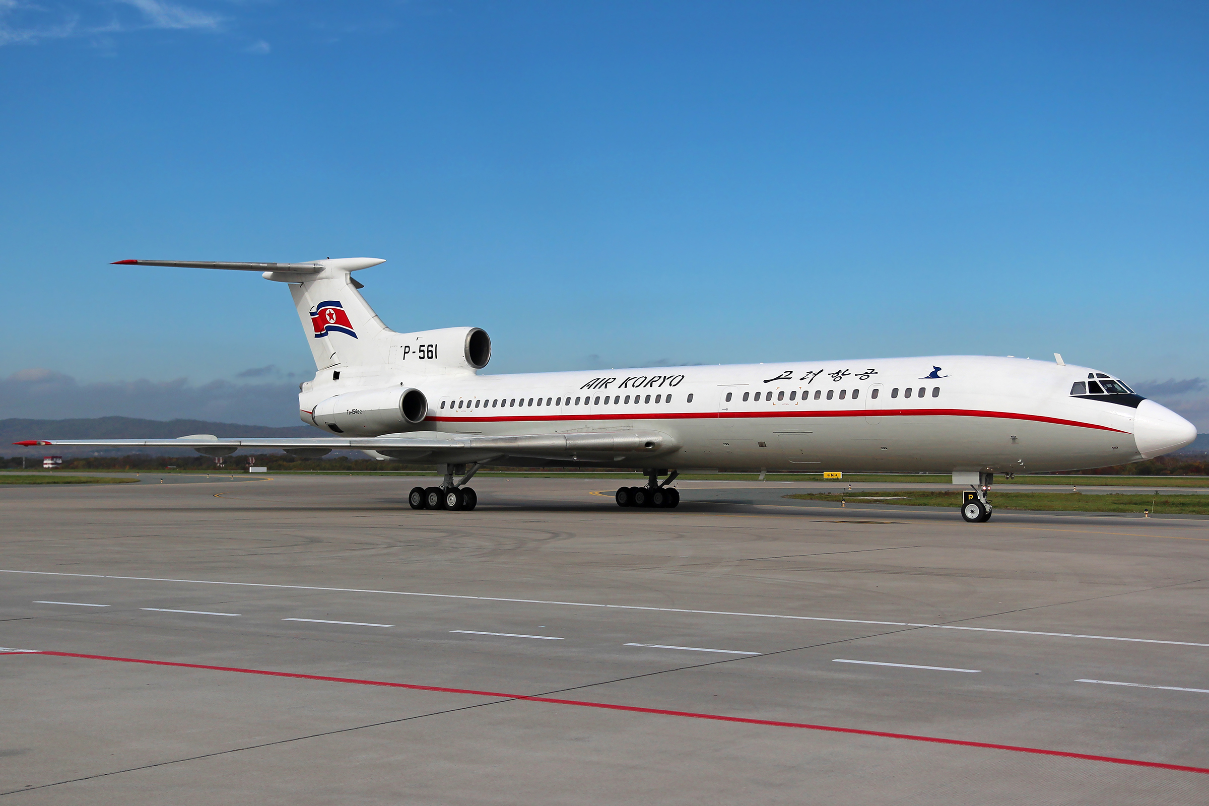 Ту-154 в обновленной ливрее в аэропорту Владивостока на официальном осеннем споттинге 2018